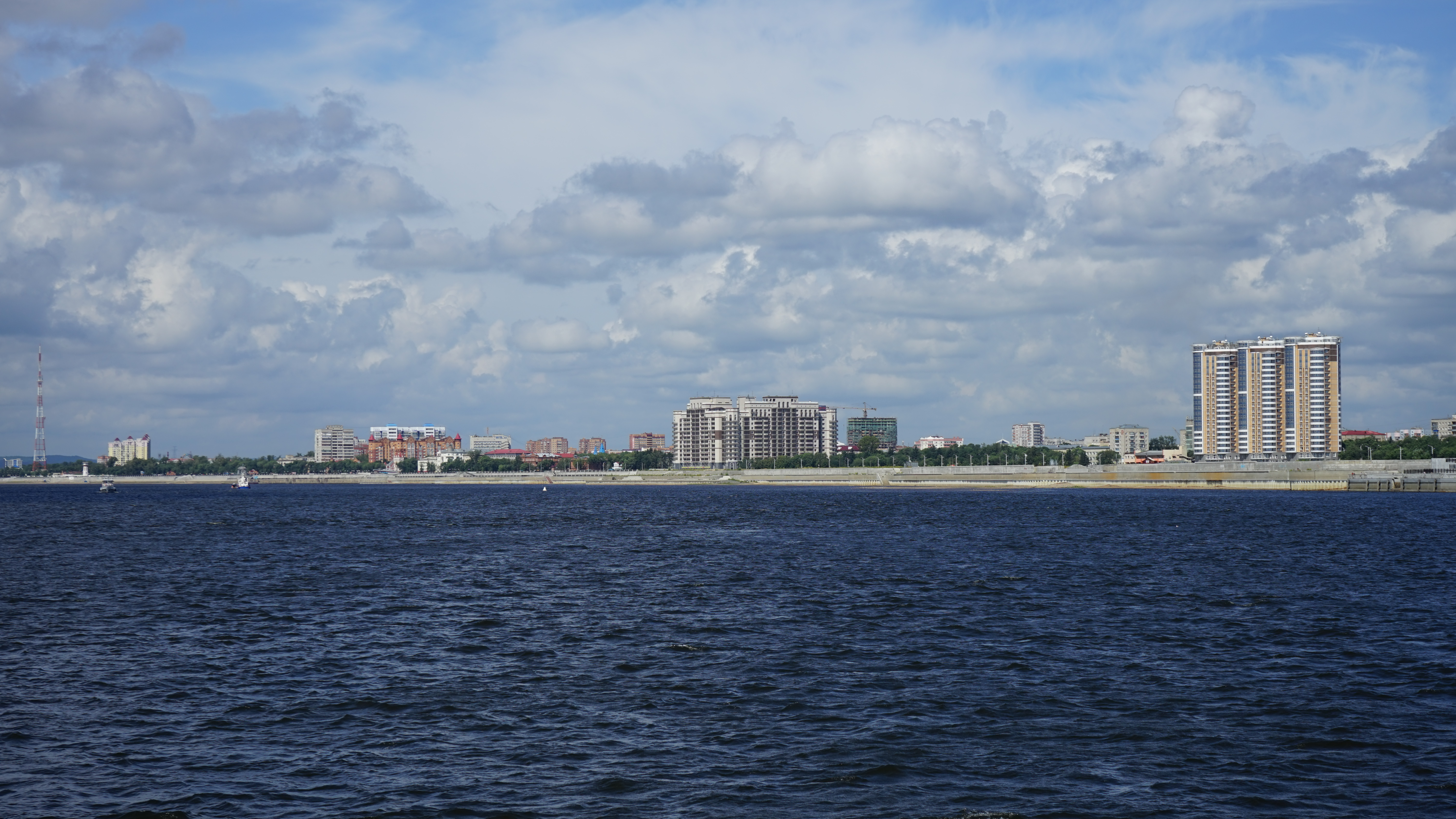 中文（中国大陆）: 黑河-布市客轮远眺布拉戈维申斯克